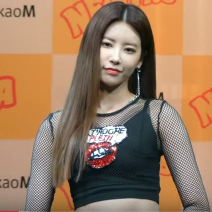 20일 오후 서울시 도봉구 창동 플랫폼 창동 61에서 다이아의 다섯 번째 미니 앨범 'NEWTRO' 발매기념 쇼케이스가 열려 다이아가 멤버 개별 포토타임을 갖고 있다.